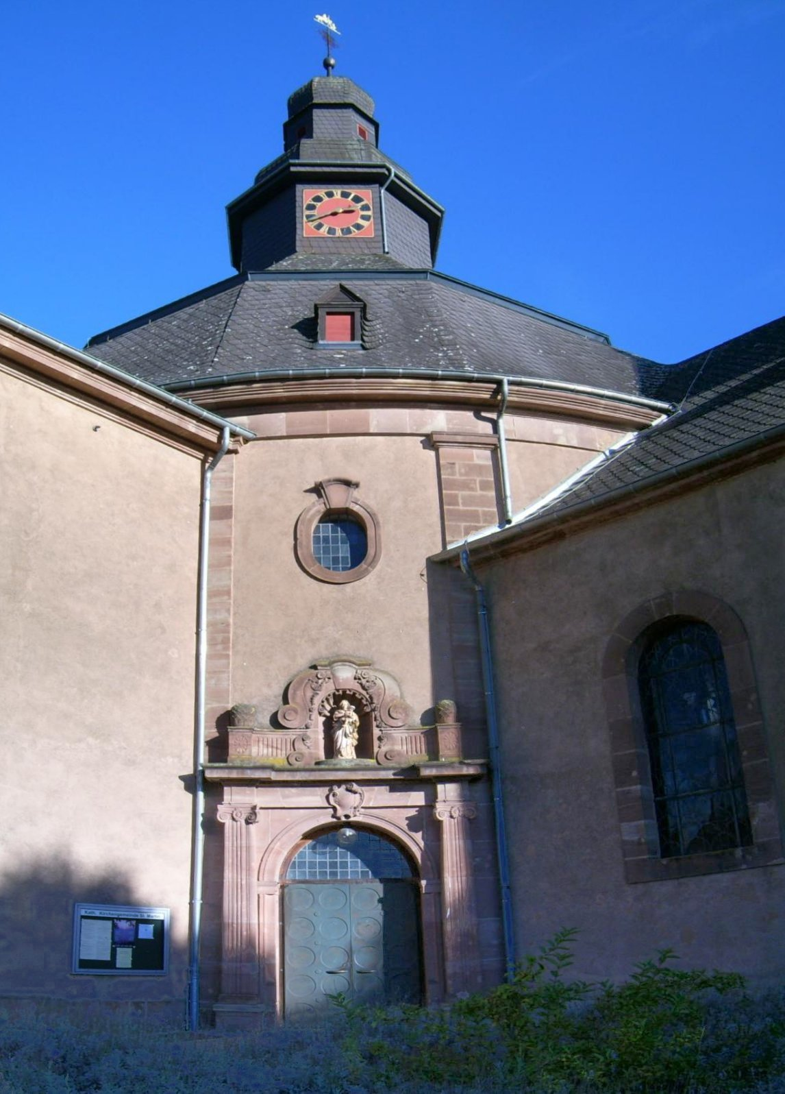 Kirche in Siersburg Church